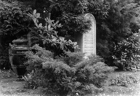 Familiengrabstätte Pallat in Göttingen mit Otto Erich Hartlebens Urne